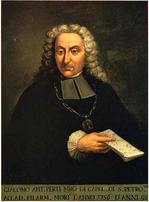 Porträt des Giacomo Antonio Perti (1661-1756), italienischer Komponist, im Museo internazionale e biblioteca della musica di Bologna